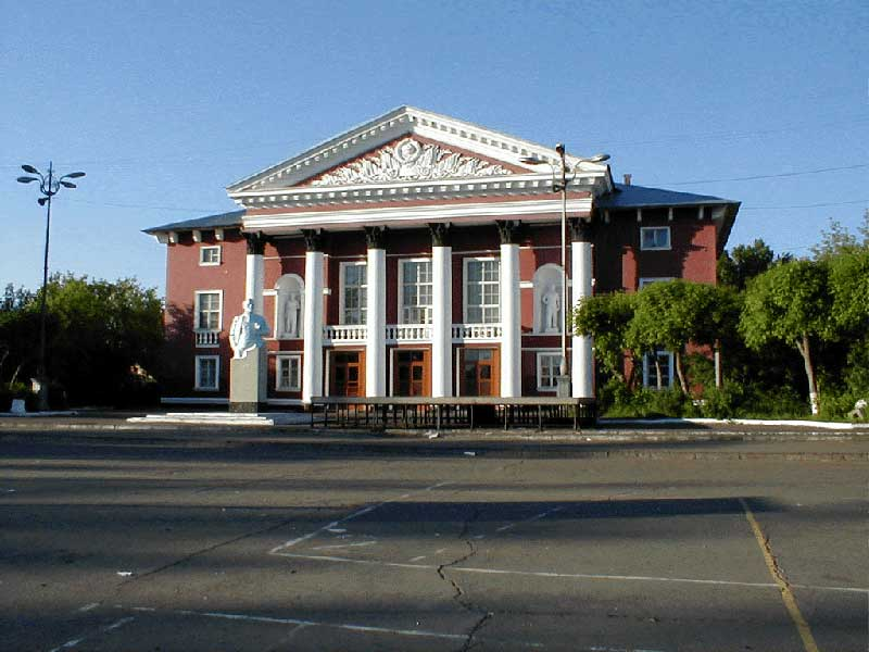 Дворец культуры "Дружба"